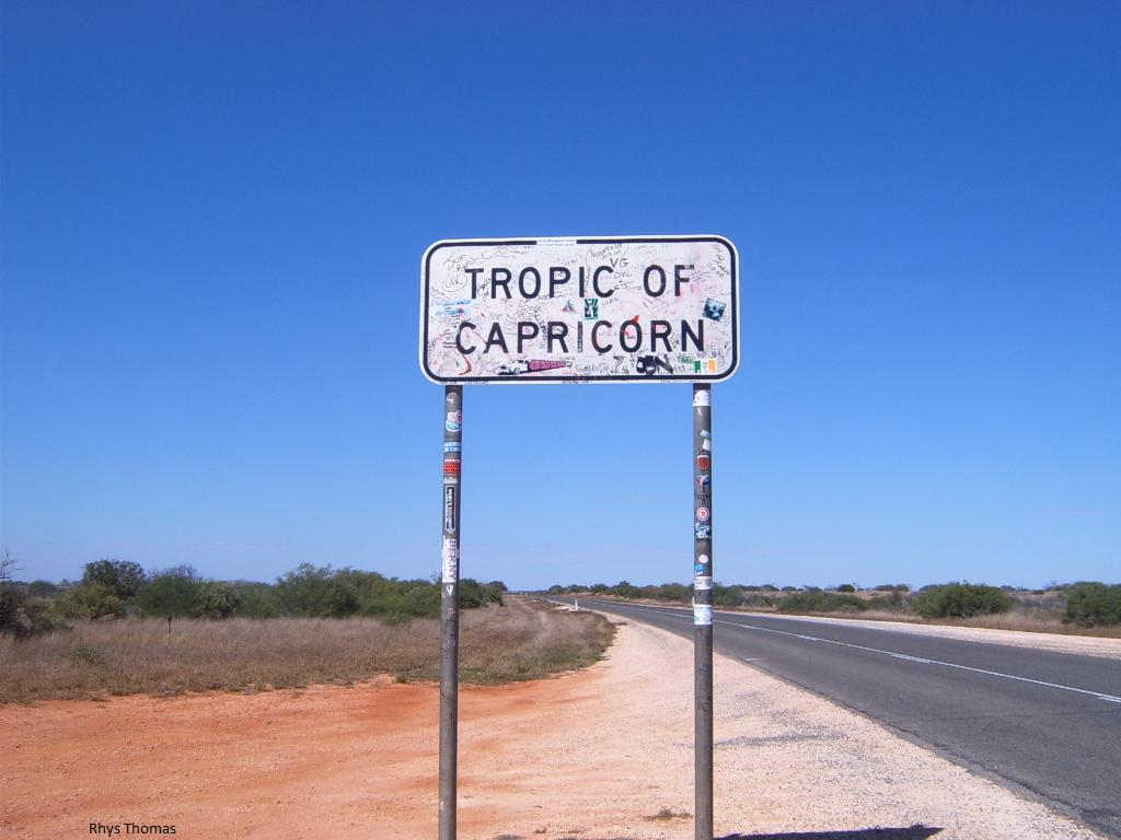 Trofan yr Afr yn agos i Coral Bay, Gorllewin Awstralia